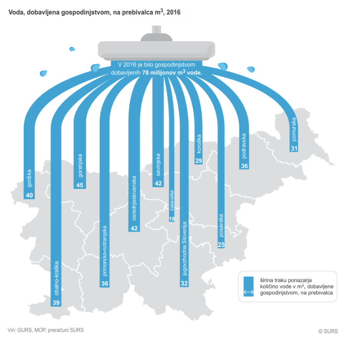 Voda, dobavljena gospodinjstvom, 2016